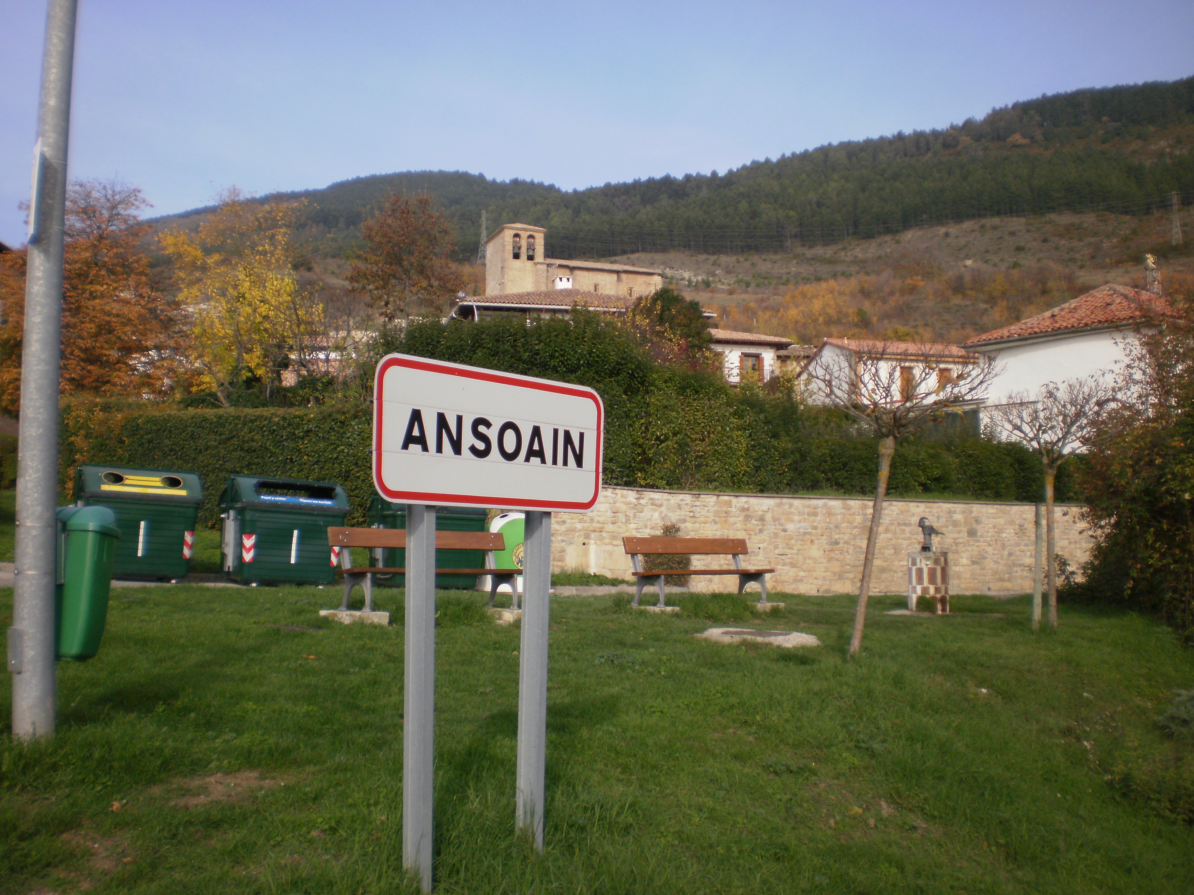 Cartel con el nomb re de Ansoáin en el pueblo viejo.